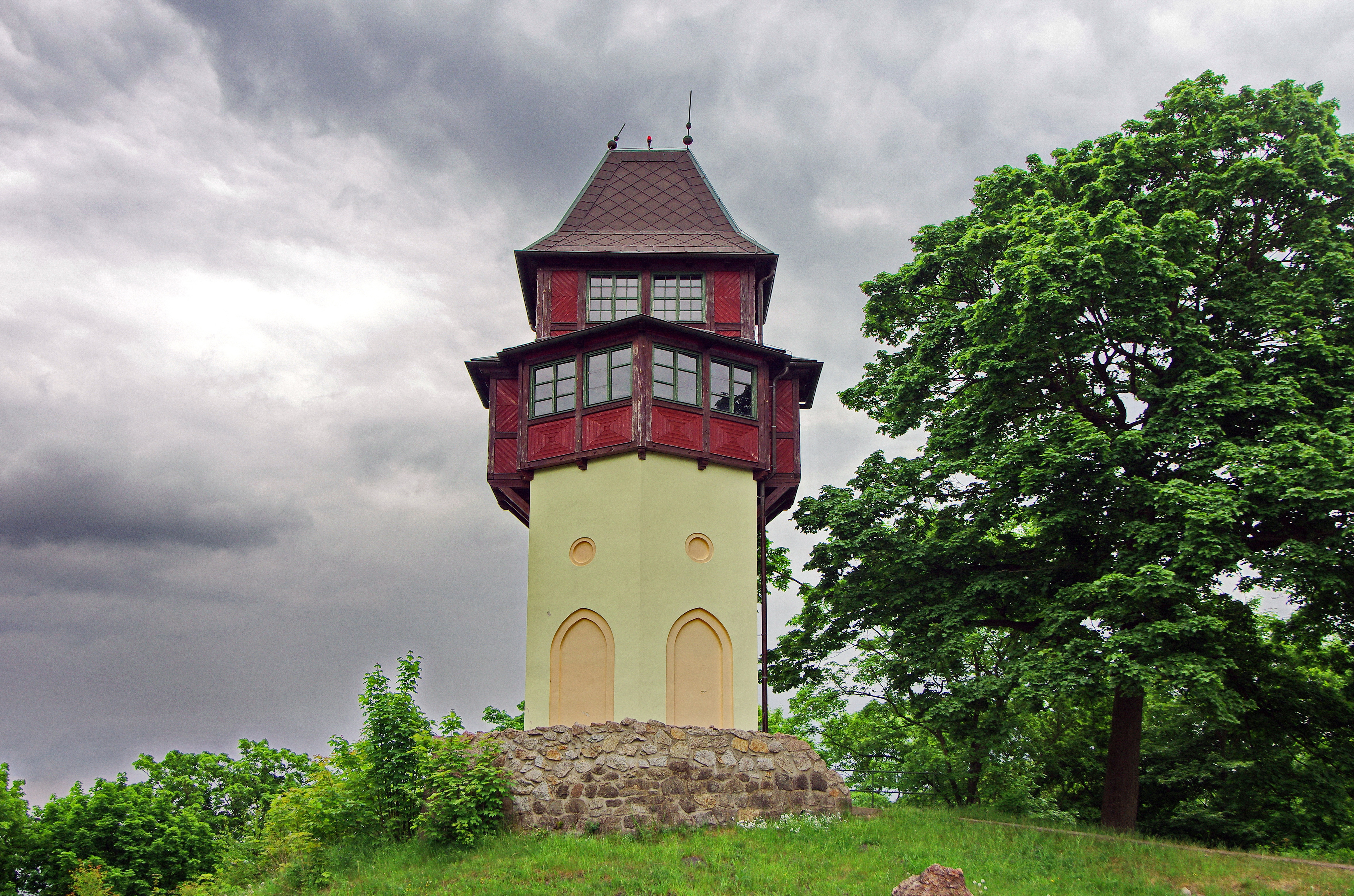 Rozhledna Hard, Sokolov, Hornická ulice